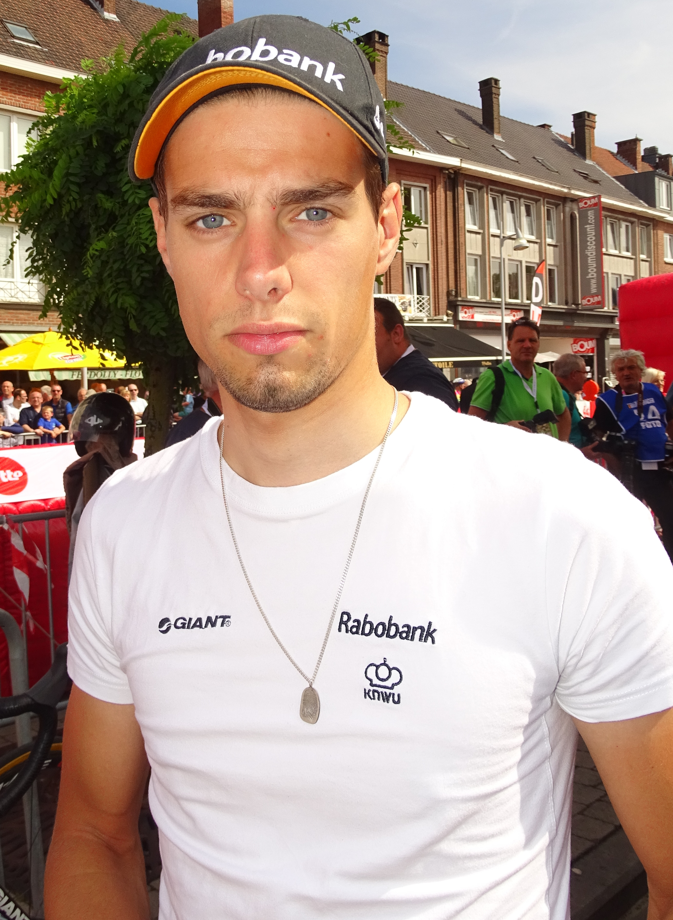 Reportage réalisé le mercredi 22 juillet à l'occasion du départ du Grand Prix Pino Cerami 2015 à Saint-Ghislain, Belgique.